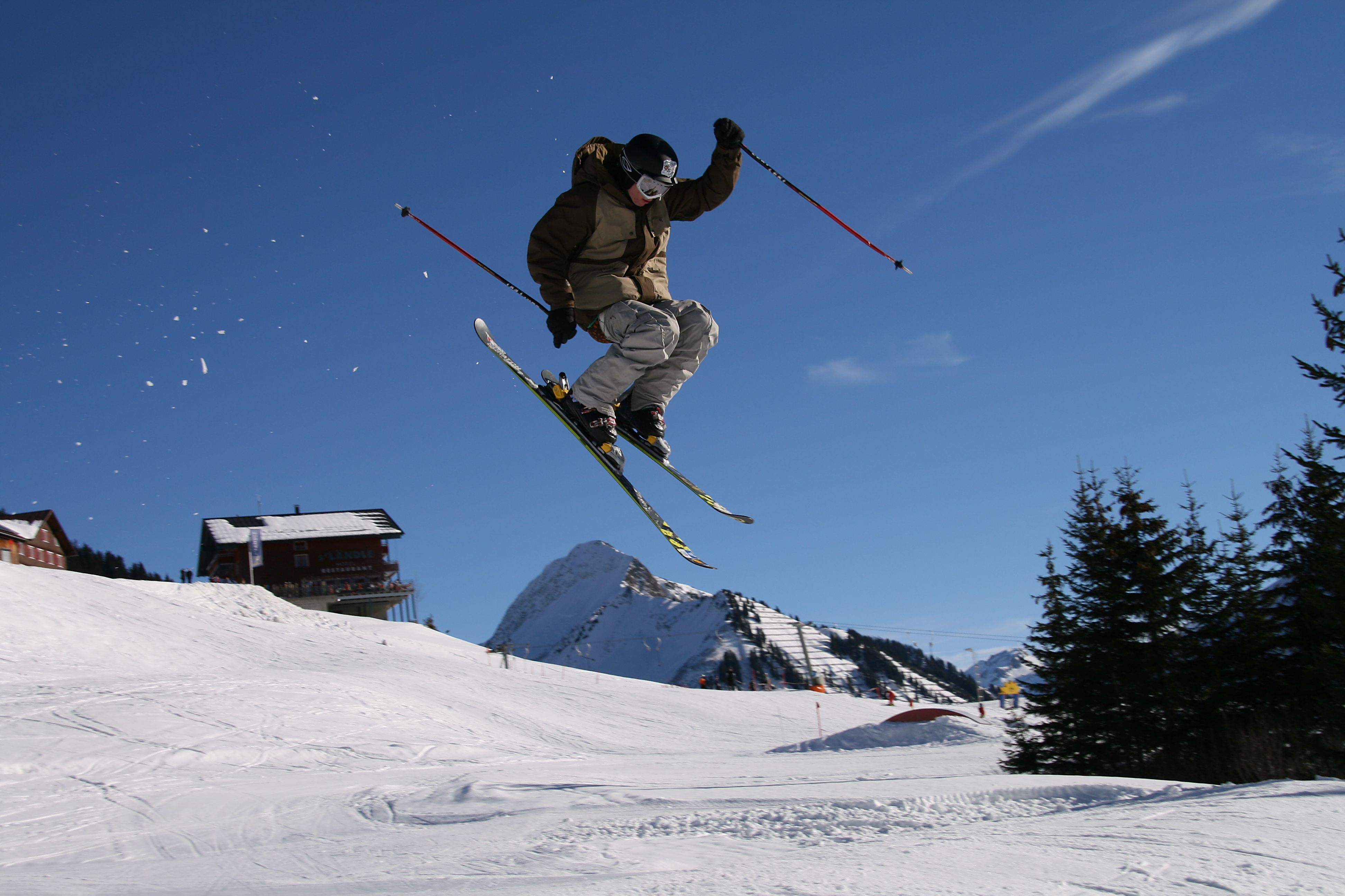 junge Bregenzerwälder beim Schanzen in Damüls-Krumbach in Vorarlberg.